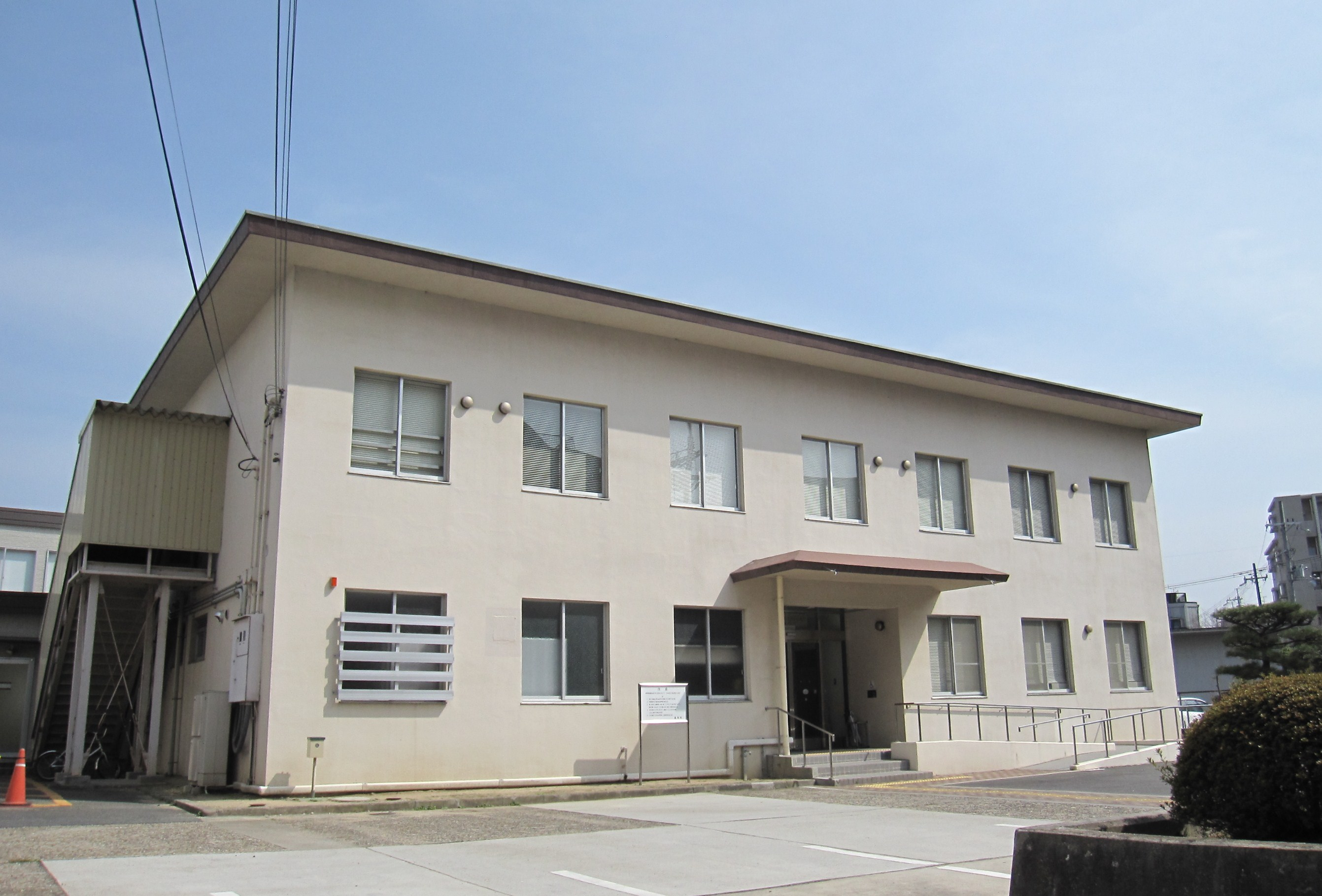 枚方簡易裁判所